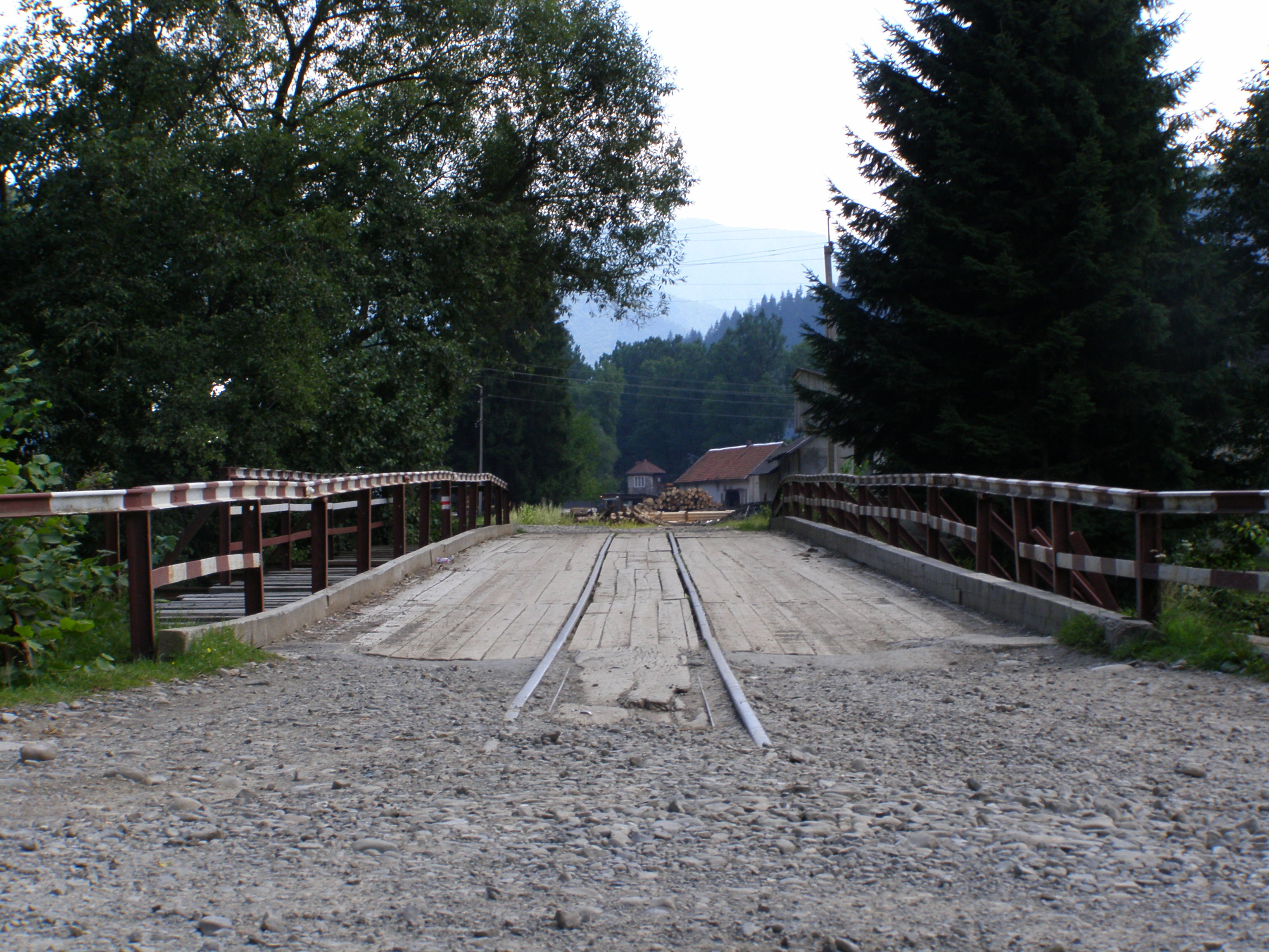 Usť-Čorna, bývalá stanice lesní železnice